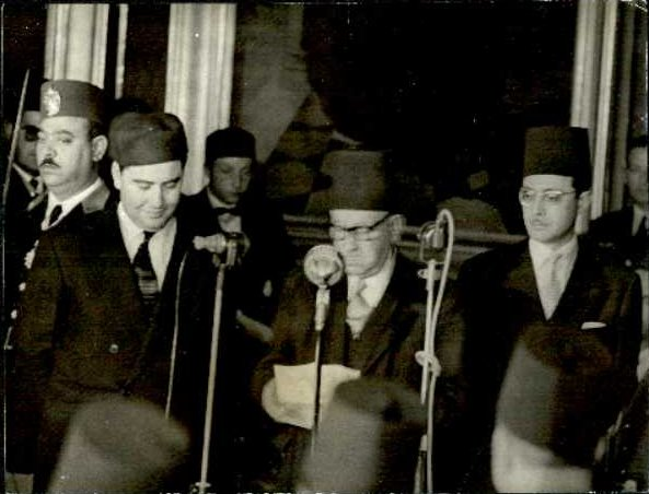 Présentation du discours inaugural de l'assemblée constituante tunisienne le 25 mars 1956 par le bureau d'âge. De gauche à droite : Ahmed Ben Salah (benjamin d'âge), M'hamed Chenik (doyen d'âge) et Ahmed Mestiri (benjamin d'âge).